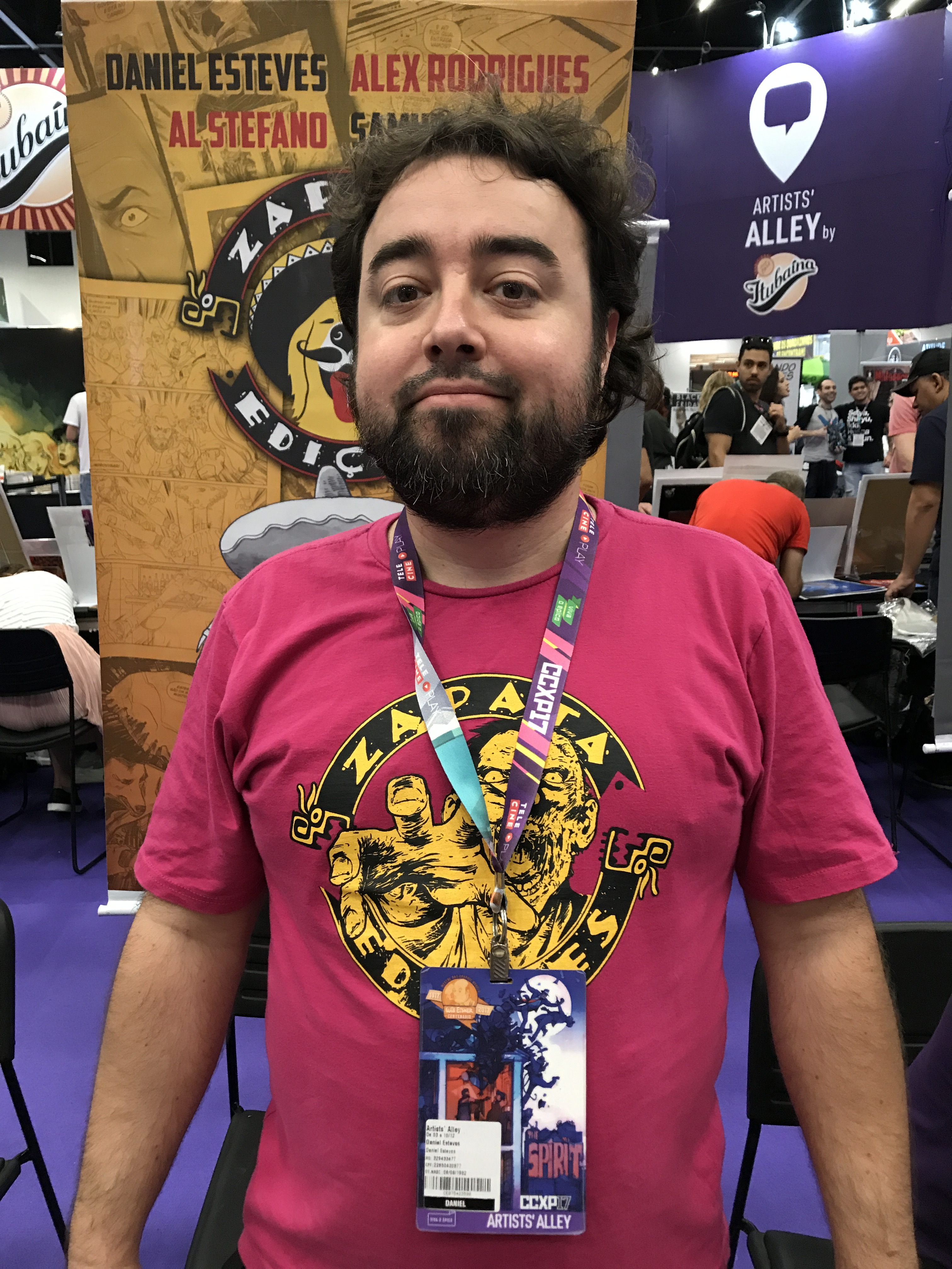 Artista Daniel Esteves na edição de 2017 da Comic Con Experience